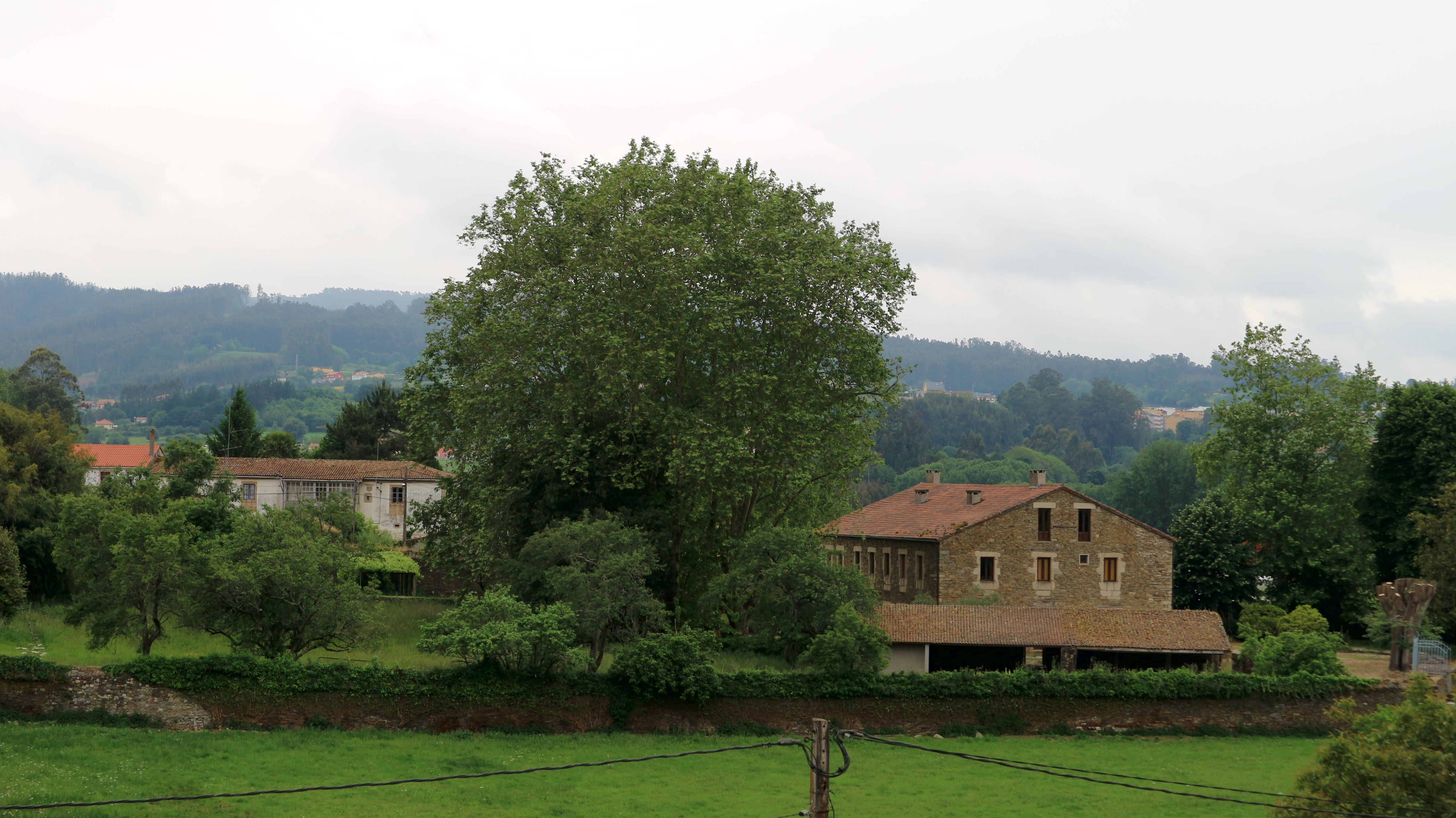 Casa do Convento de Sarandós (a esquerda) e a casa reitoral (no centro ao fondo). Na Calle, Sarandós, Abegondo.